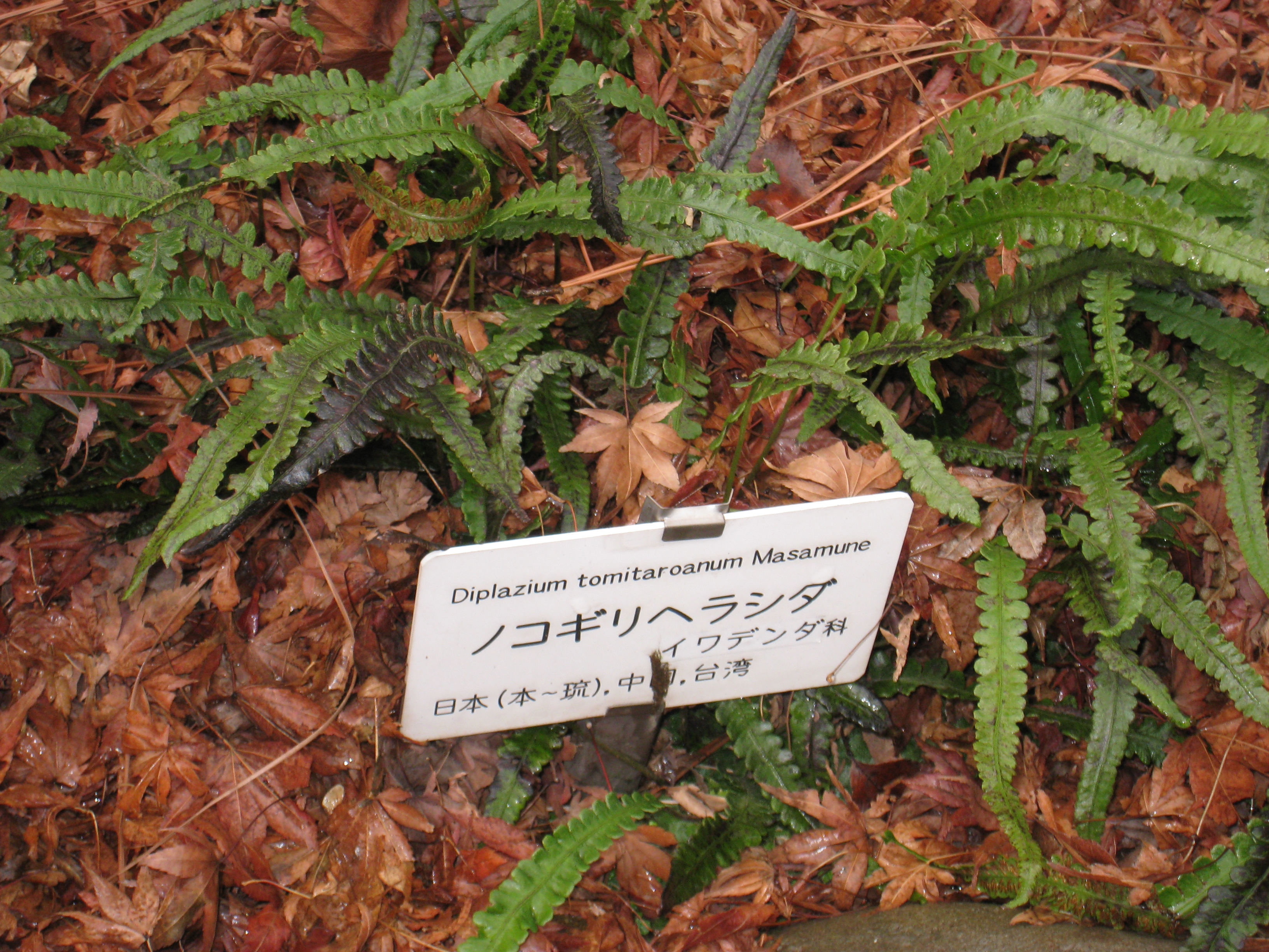 Diplazium tomitaroanum Masamune in Koishikawa Botanical Gardens, Tokyo, Japan.